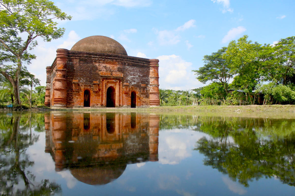 চুনাখোলা মসজিদ